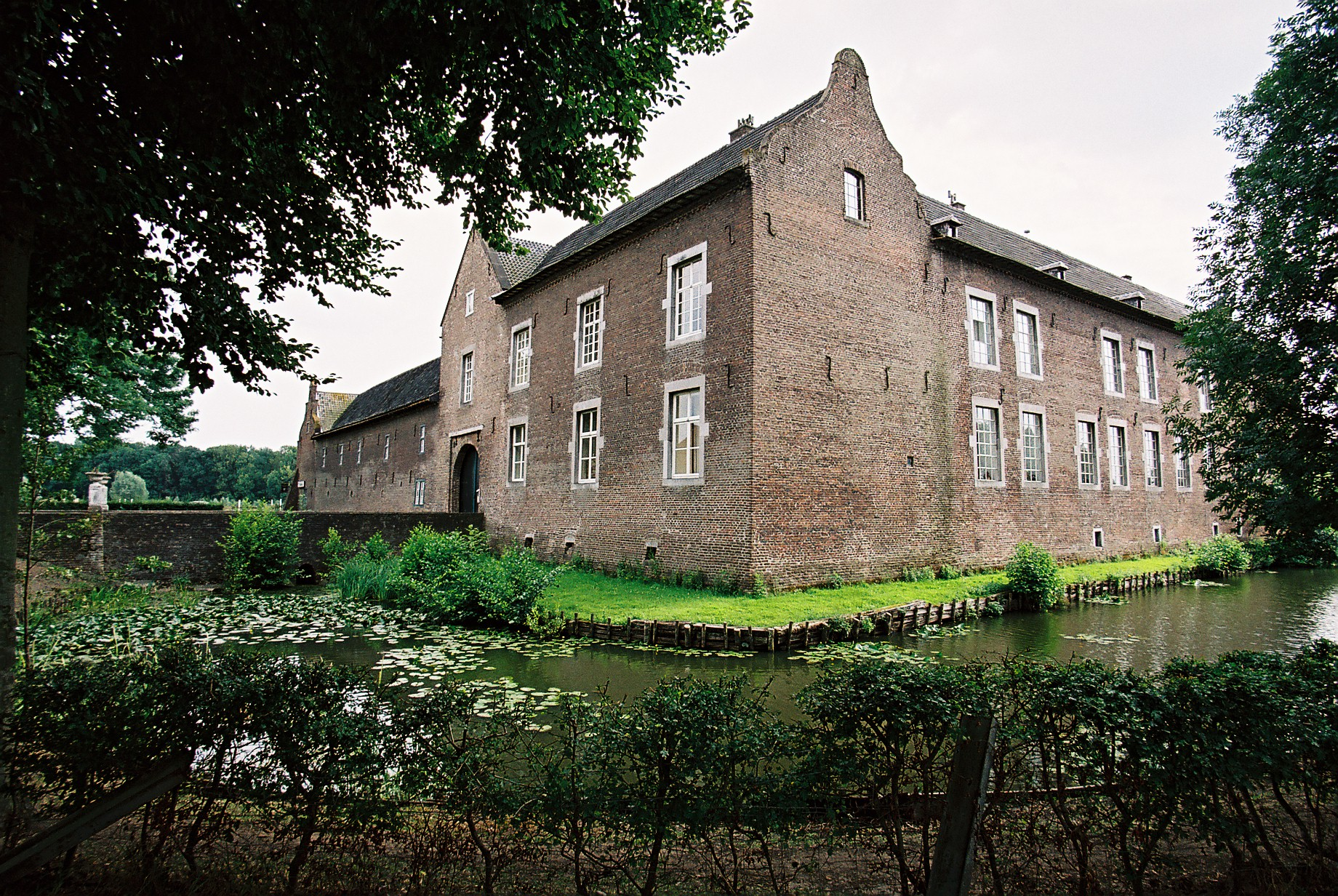 Kasteel ter Borgh te Schinnen.